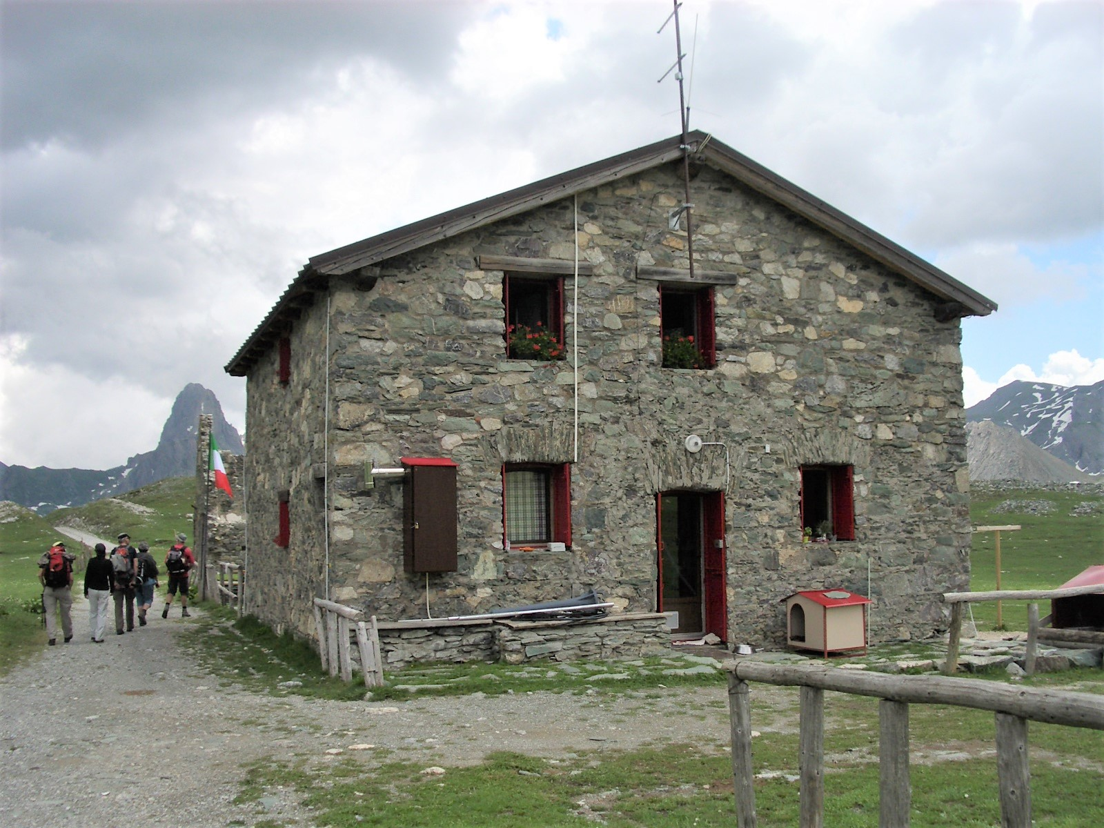 Acceglio, Maira Valley, Italy